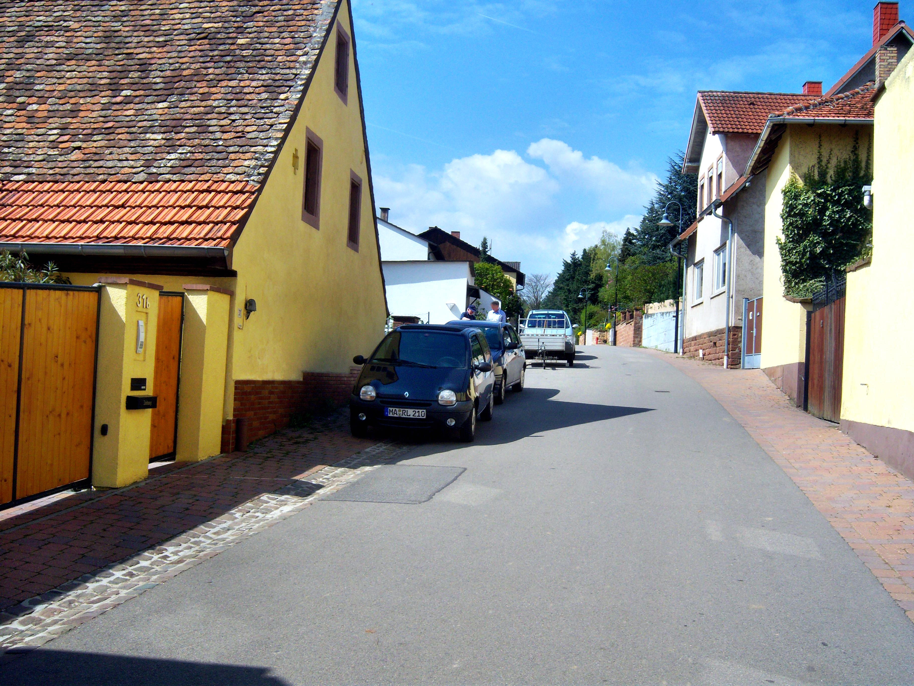 Die Hauptstraße von Battenberg in der Pfalz (Deutschland)